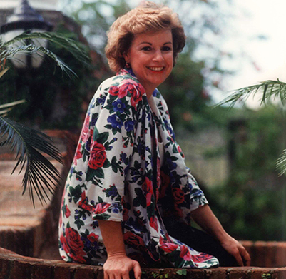 Primera Dama de Puerto Rico